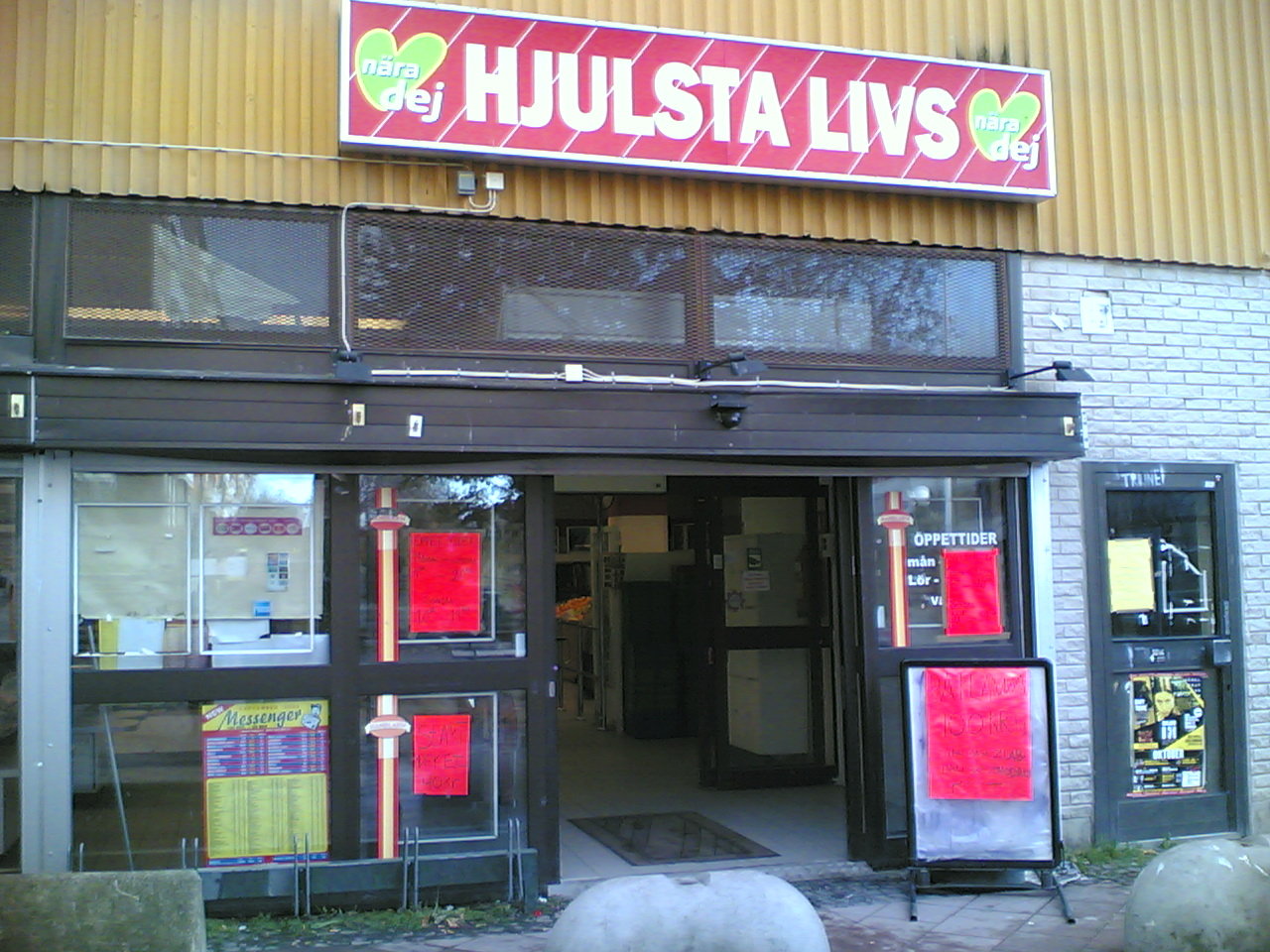 Hjulsta immigrant market Hjulsta Livs, Stockholm.